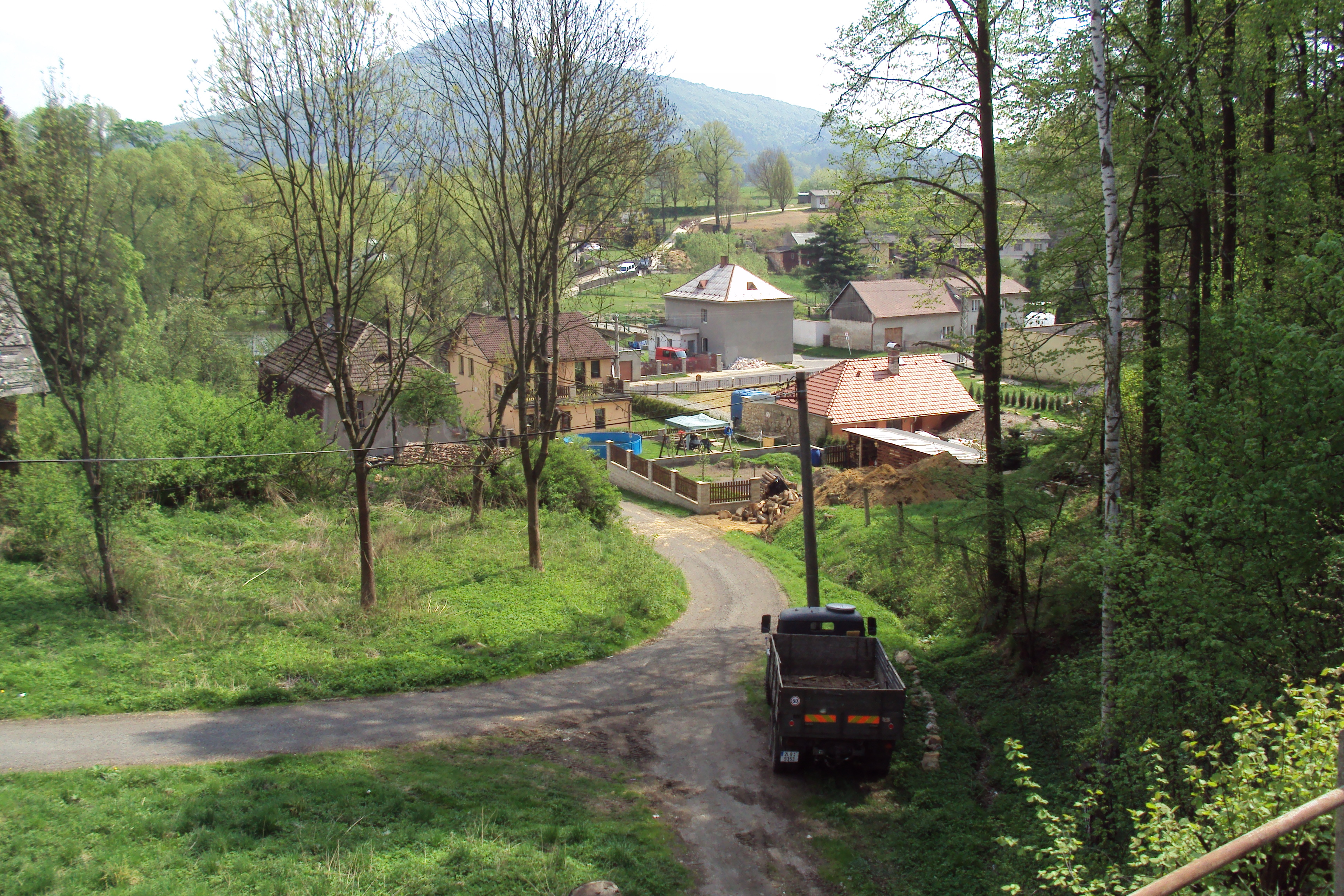 Obec Pertoltice v okresu Česká Lípa, fotka od nádraží